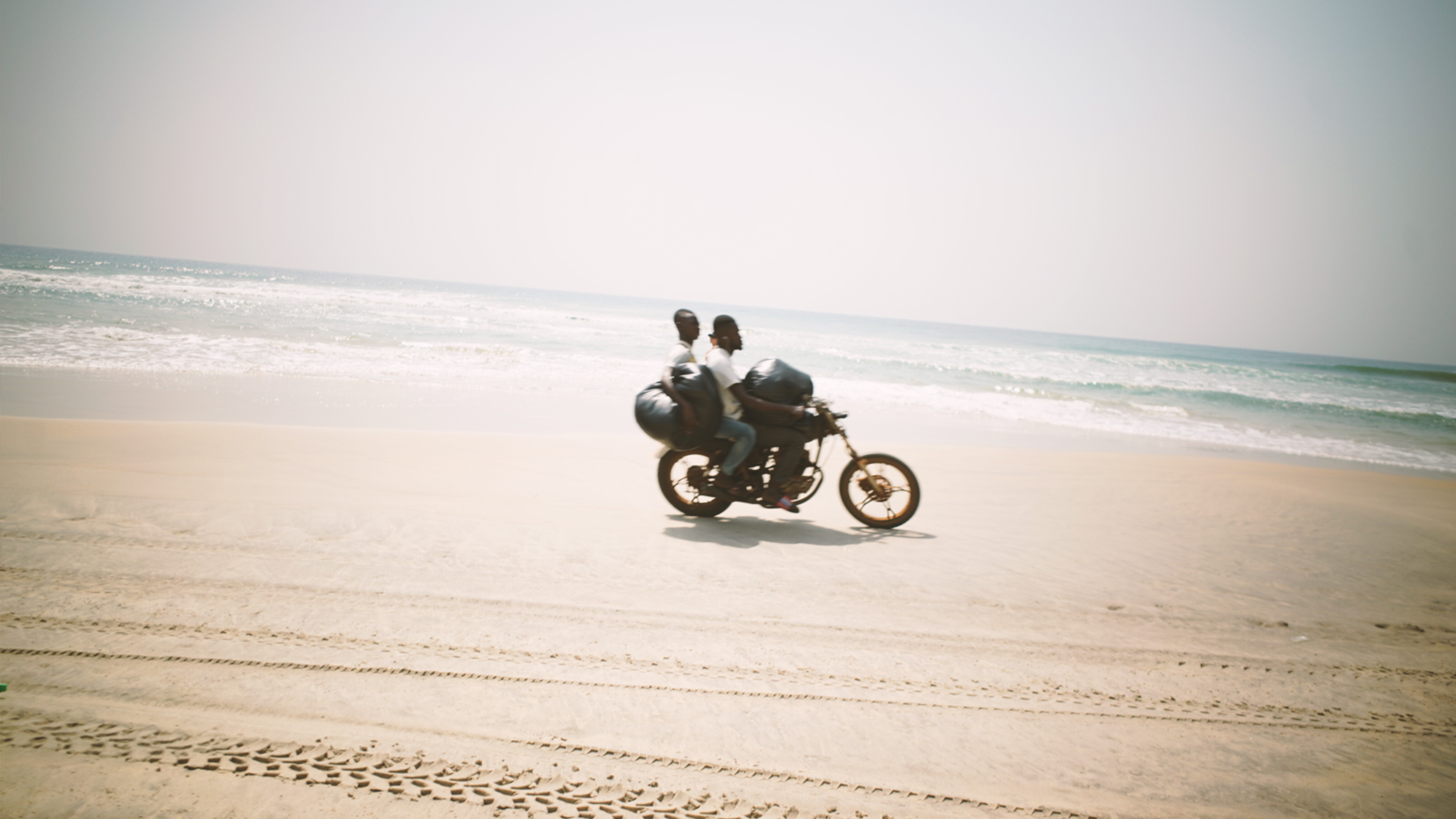 Sur la plage d'Assinie à la frontière du Ghana et de la Côte d'Ivoire, une motocyclette ce deplace avec de la marchandises. La plage comme une route. This is an image with the theme "Africa on the Move or Transport" from: Ivory Coast